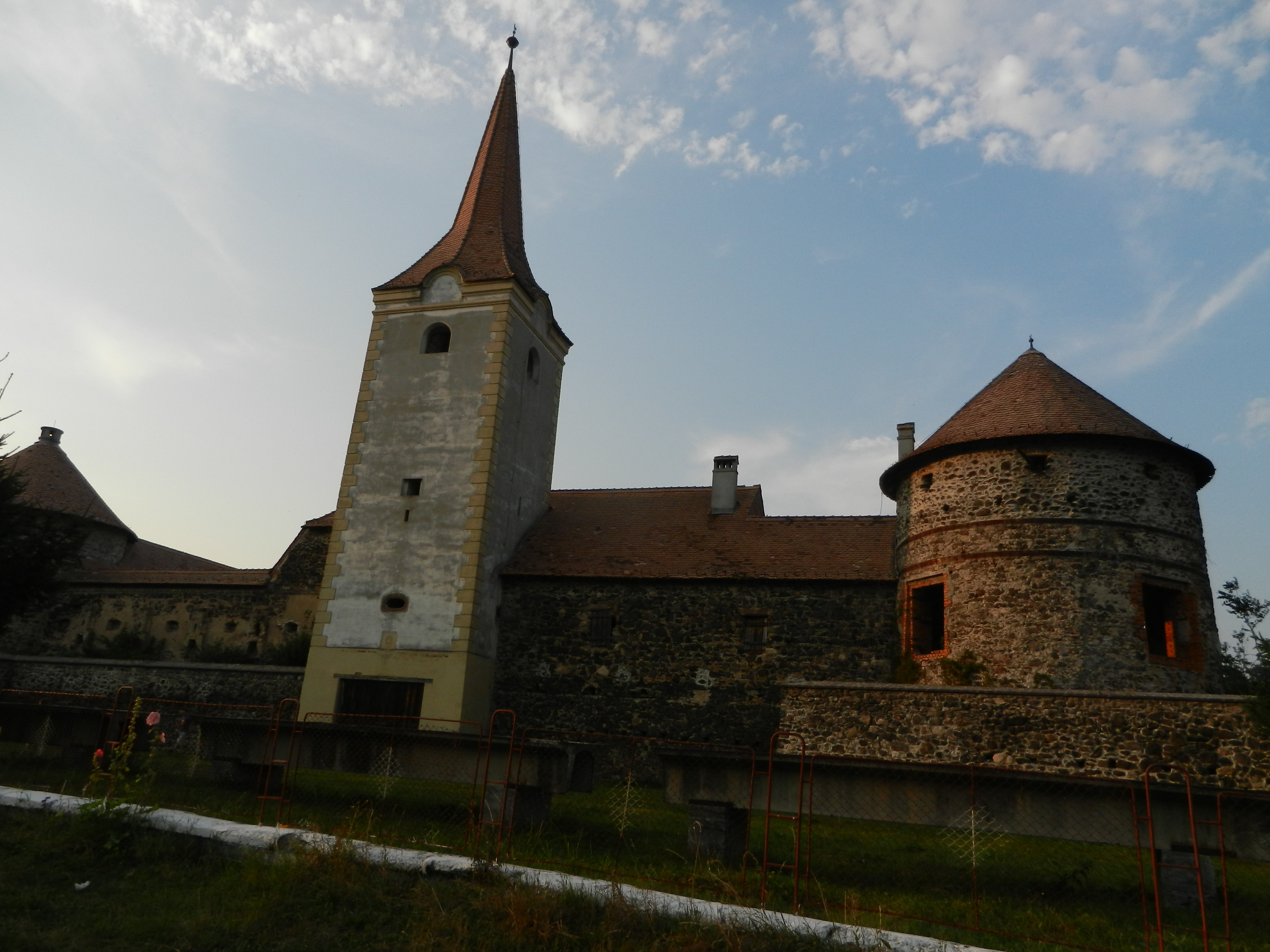 Ansamblul castelului Sükösd-Bethlen